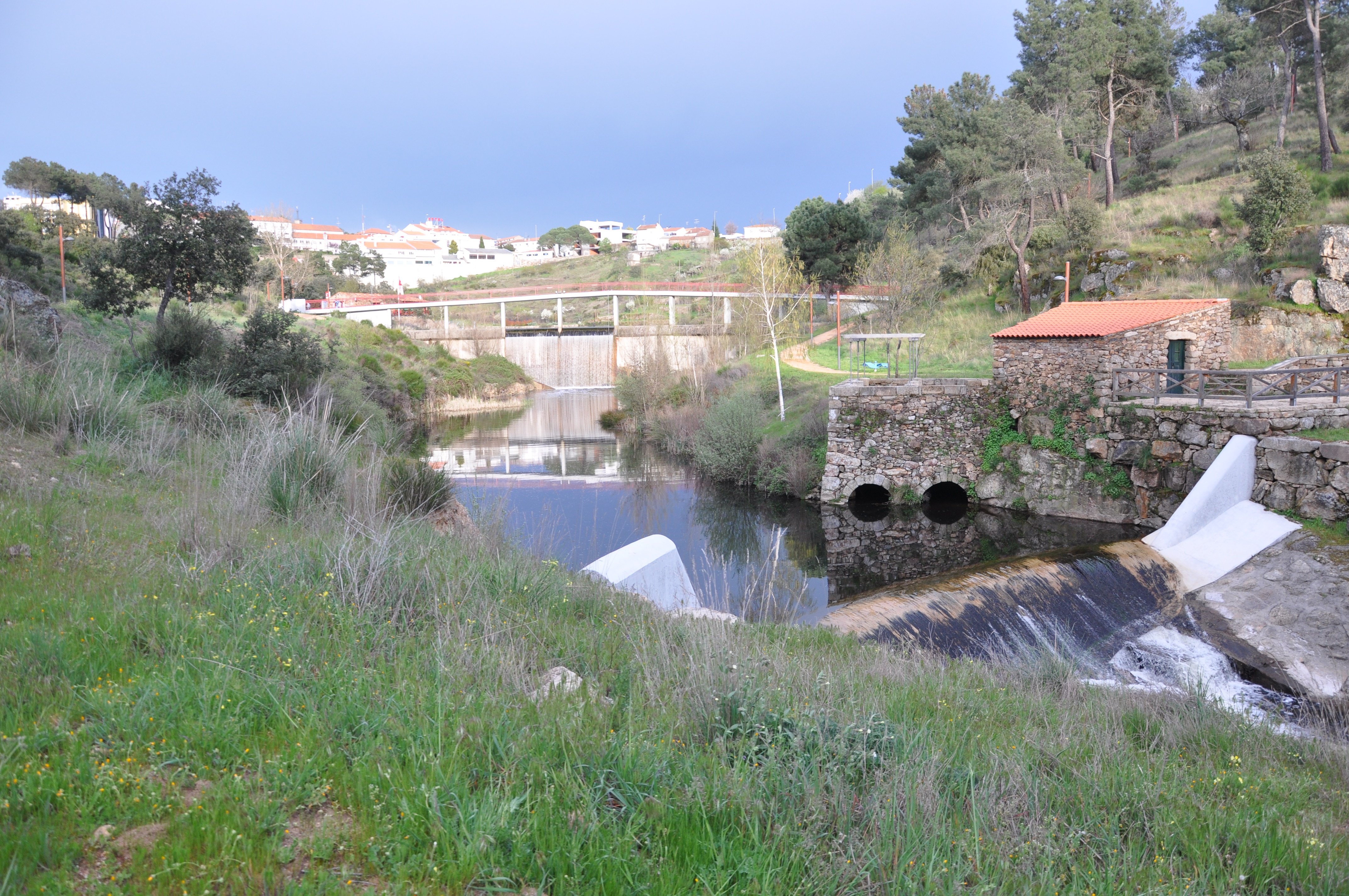 Río Fresno, Miranda de l Douro, Portugal.